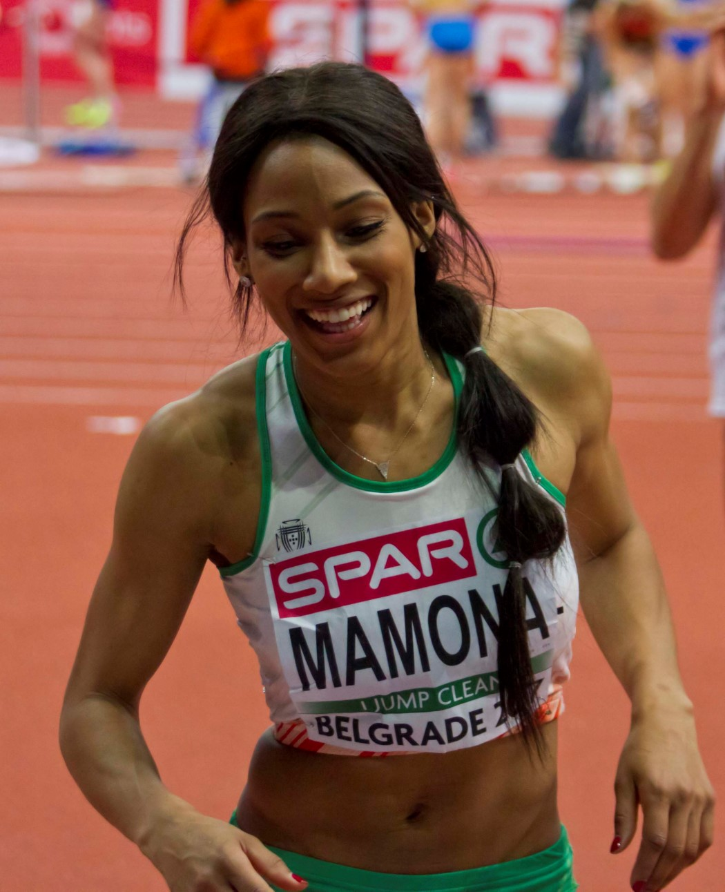 133 mamona